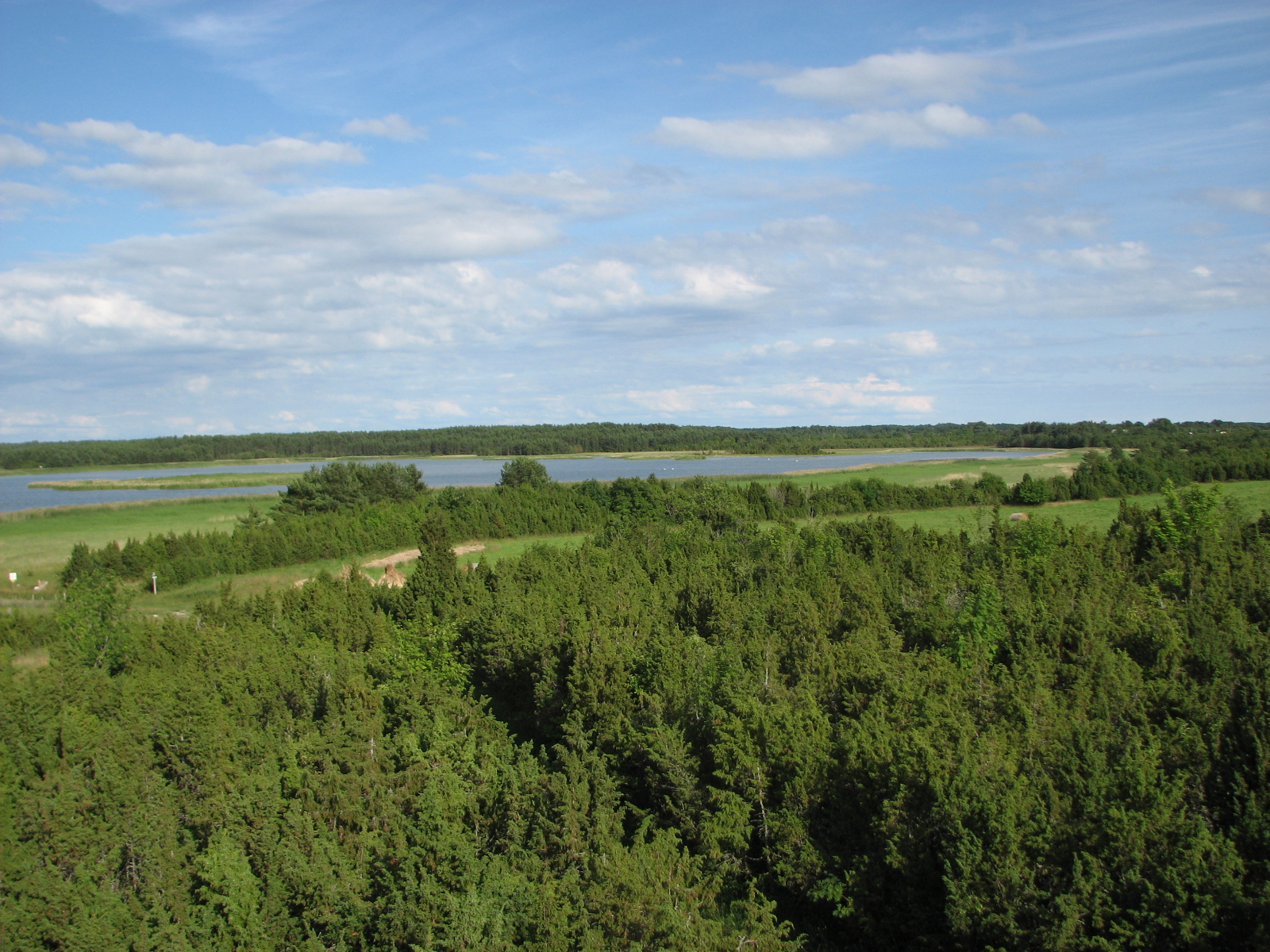 Käina Bay, Hiiumaa, Estonia. Summer 2008